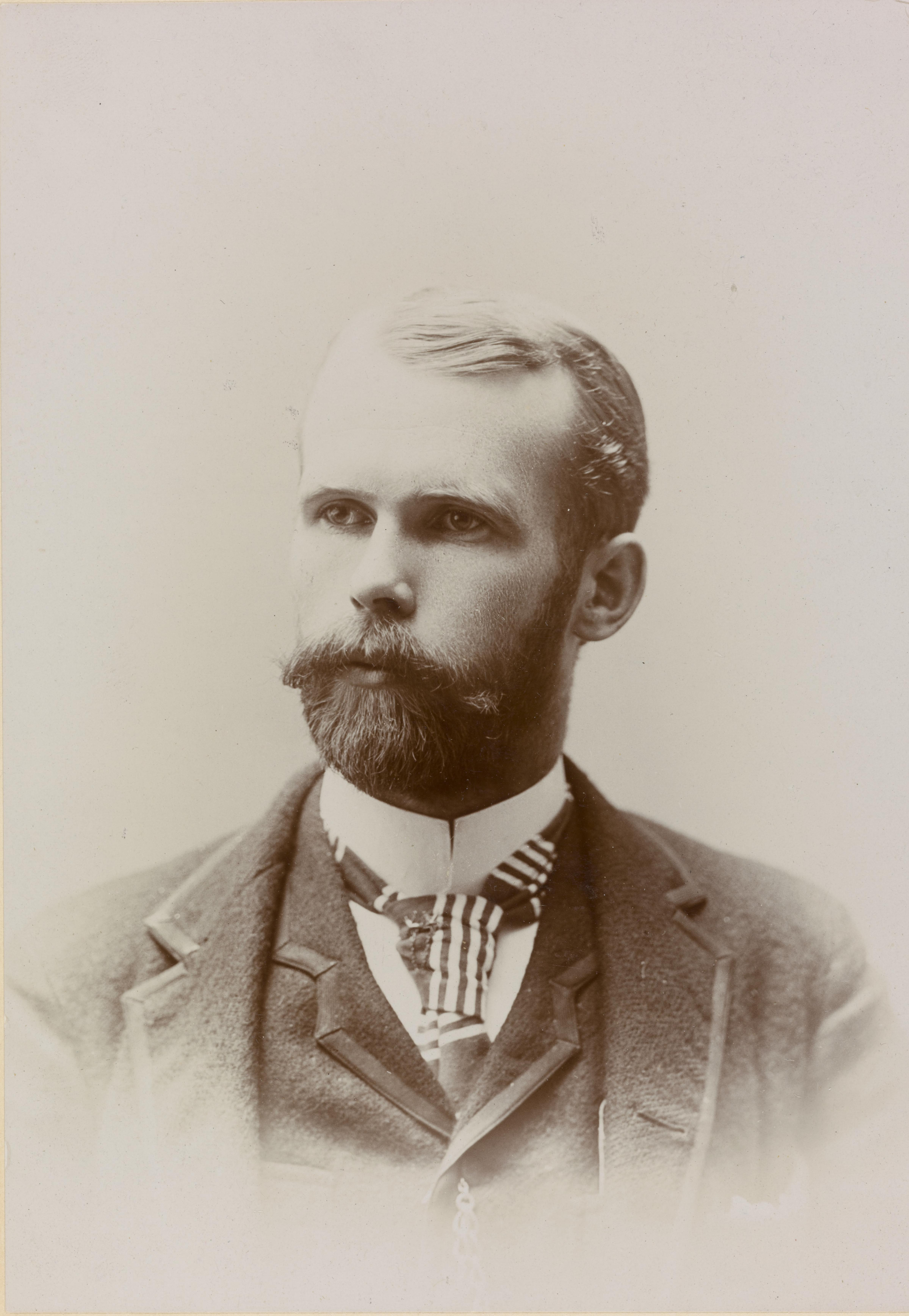 Bildet er hentet fra Nasjonalbibliotekets bildesamling Depicted person: Wilse, Anders Beer